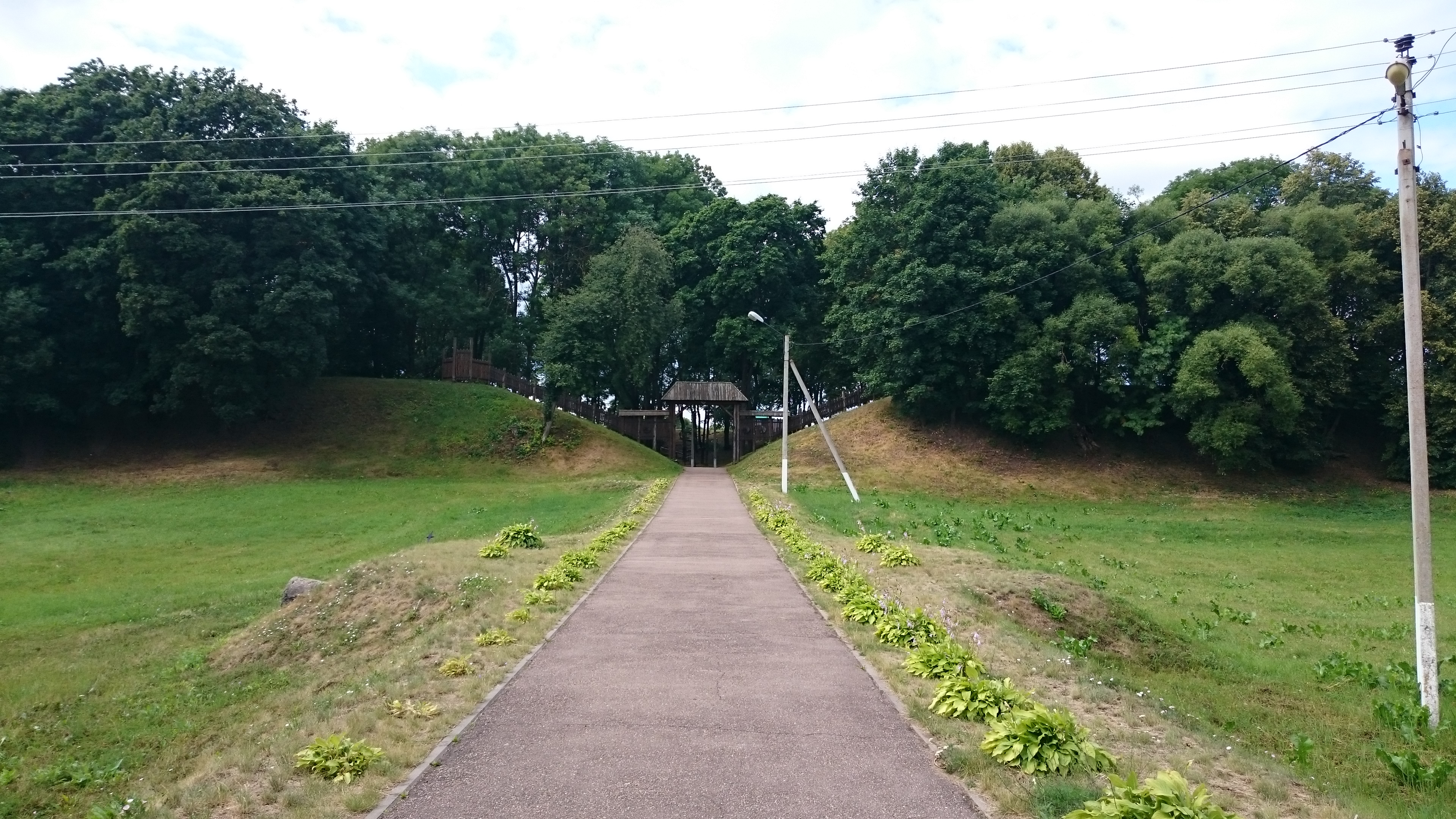 Копысский замок